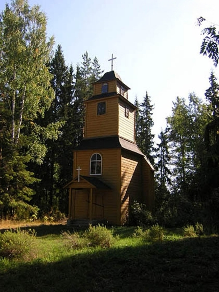 Колокольня кирхи св. Екатерины в Ильме